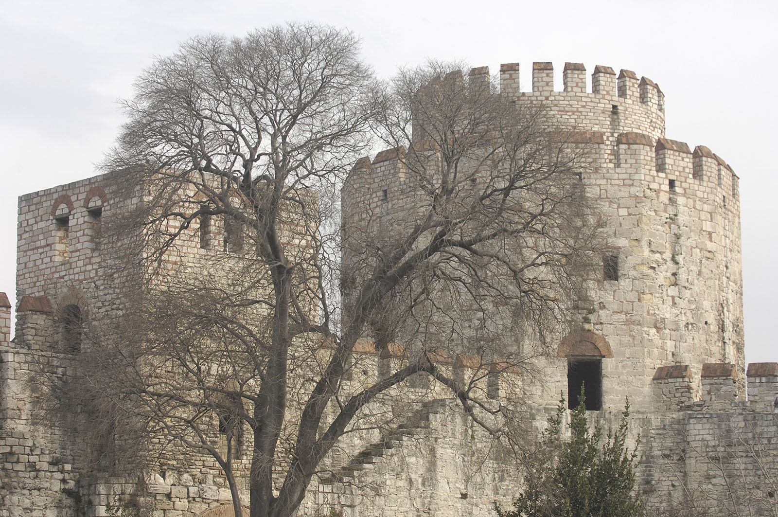 Yedikule, Turkey